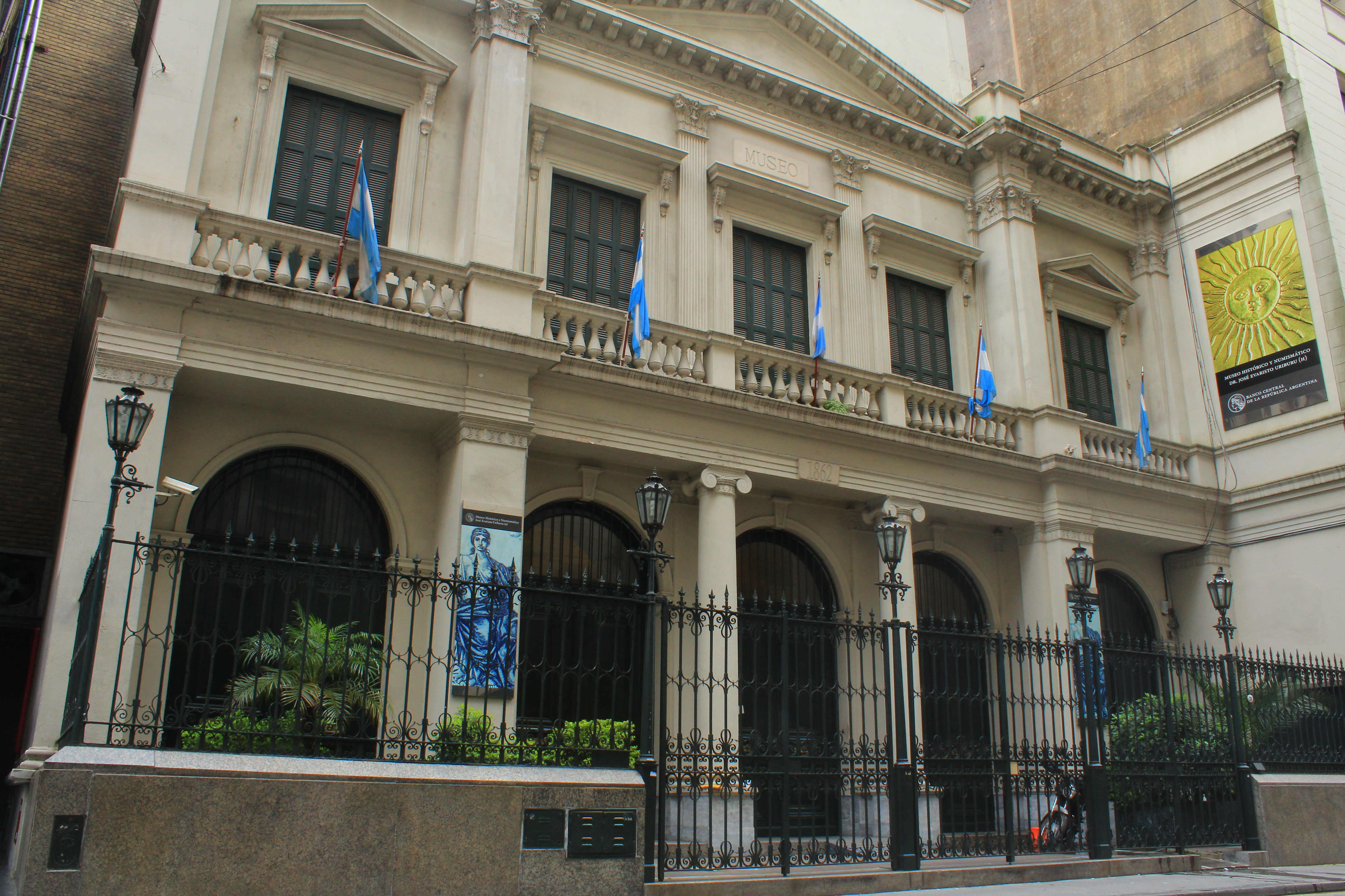 Antigua sede de la Bolsa de Comercio de Buenos Aires